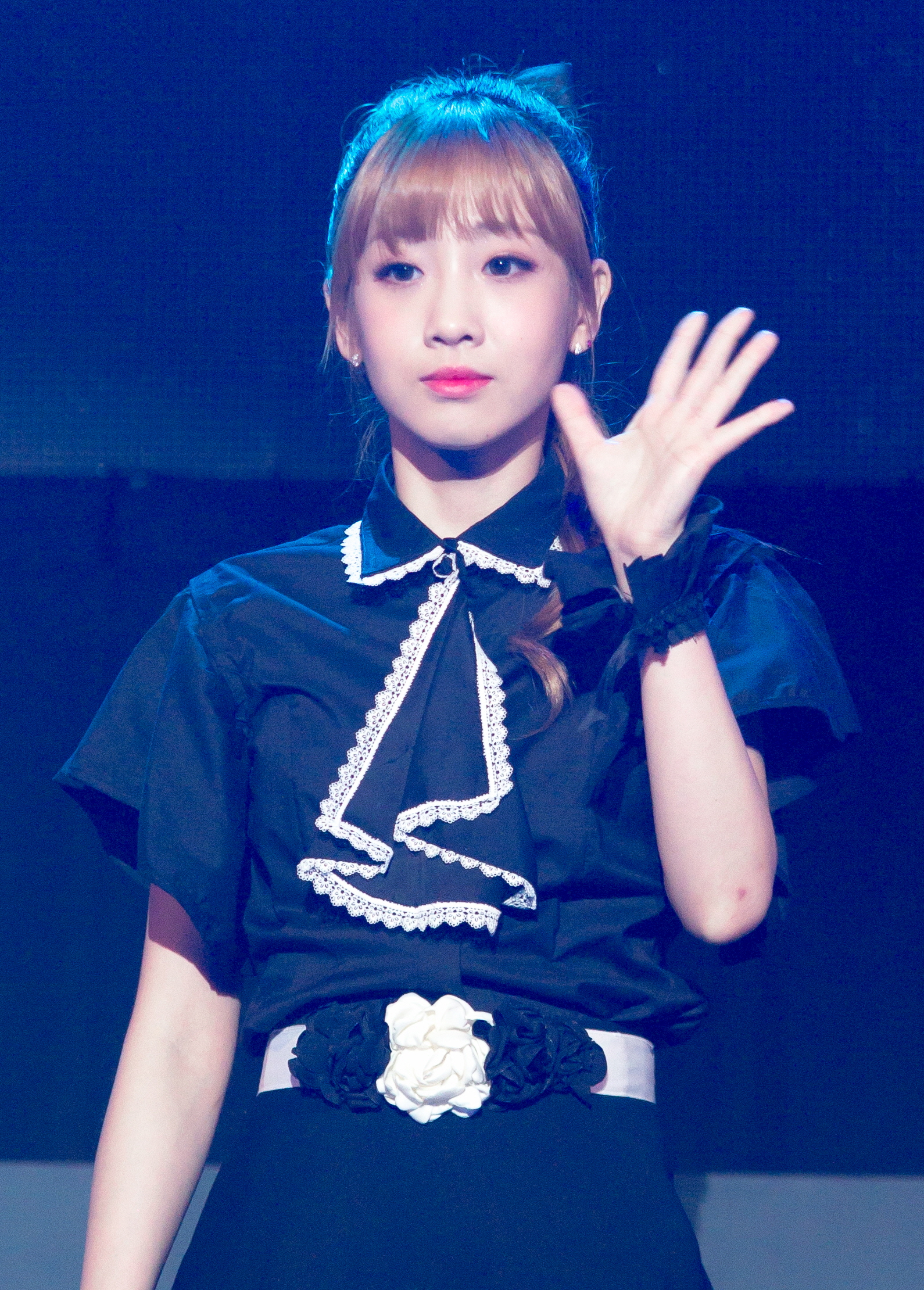 160715 러블리즈 K-creative festival 유지애